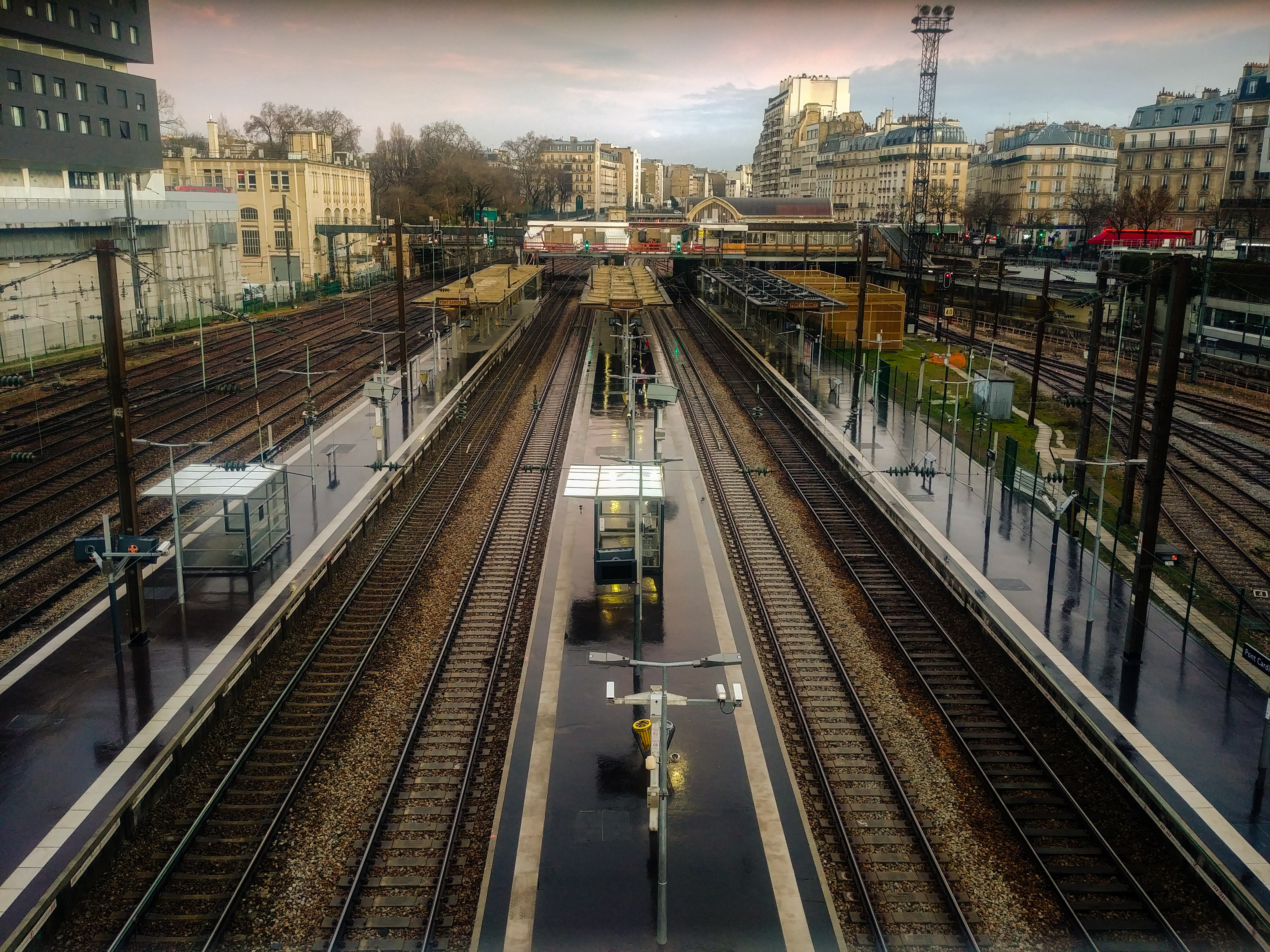 La gare de Pont Cardinet depuis le pont rue Mère Teresa, à Paris 17e arrondissement.